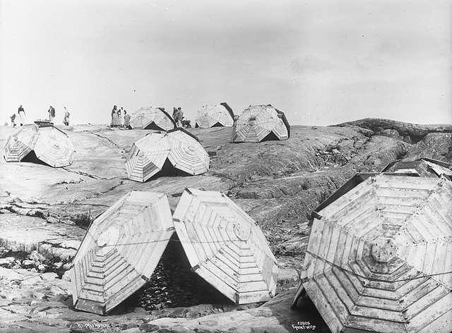 Klippfisk tørkes på berg i Kristiansund.